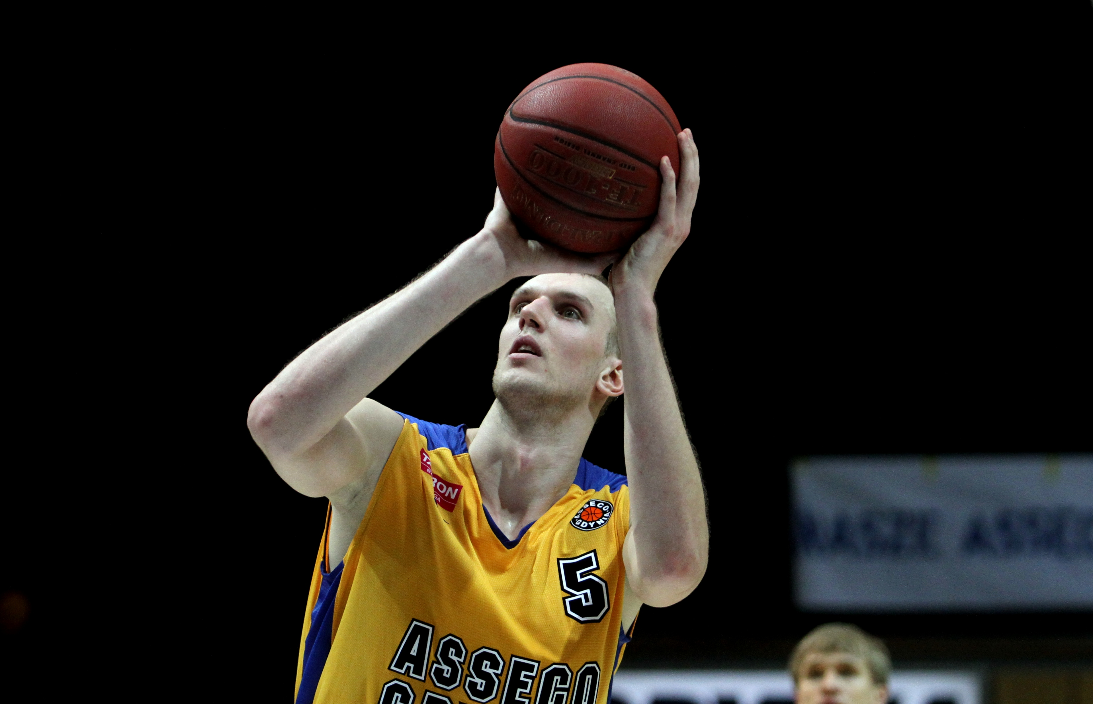 Ovidijus Galdikas Asseco Gdynia